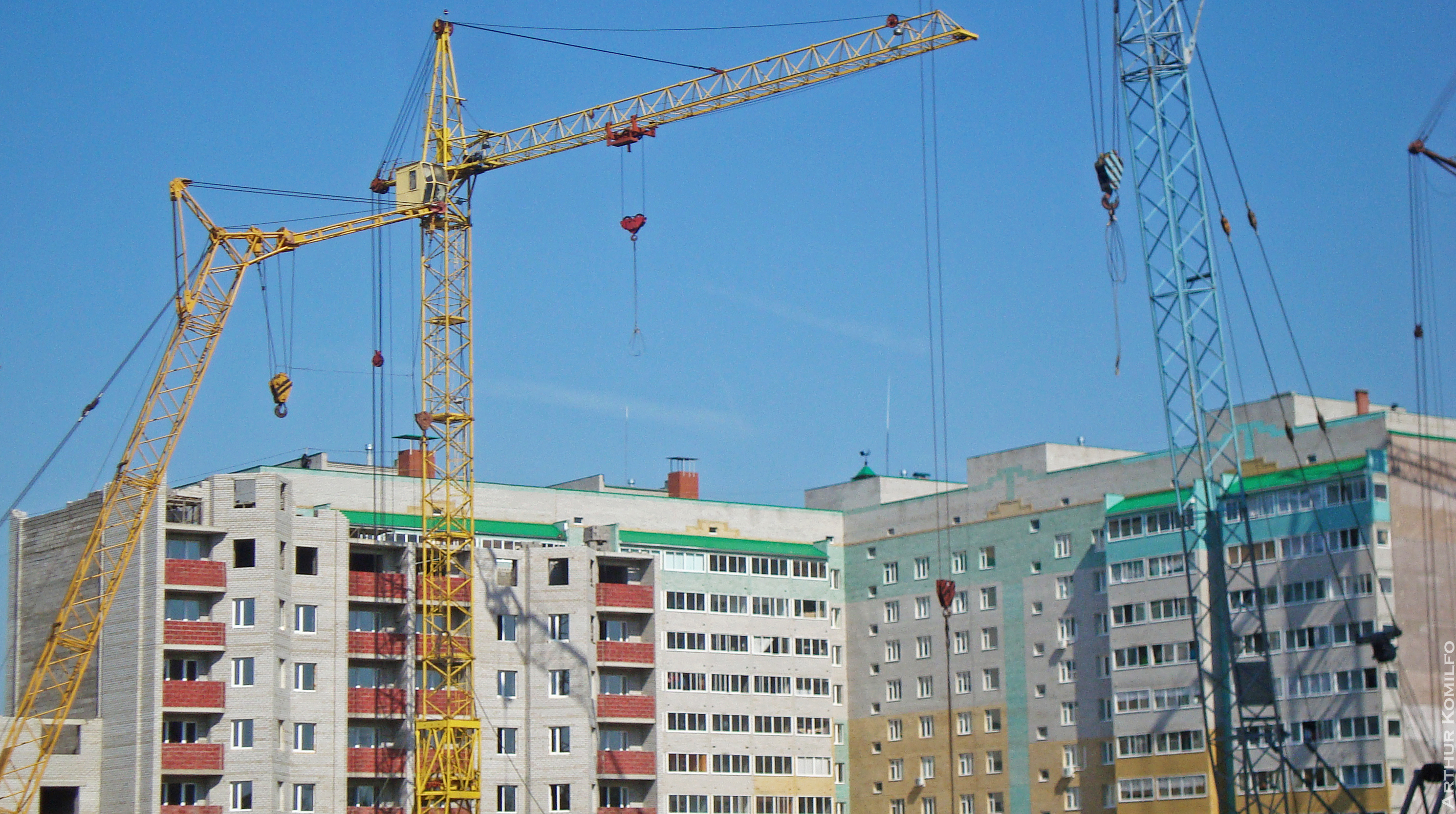 Строительство ЖК Солнечный в г.Нефтекамск